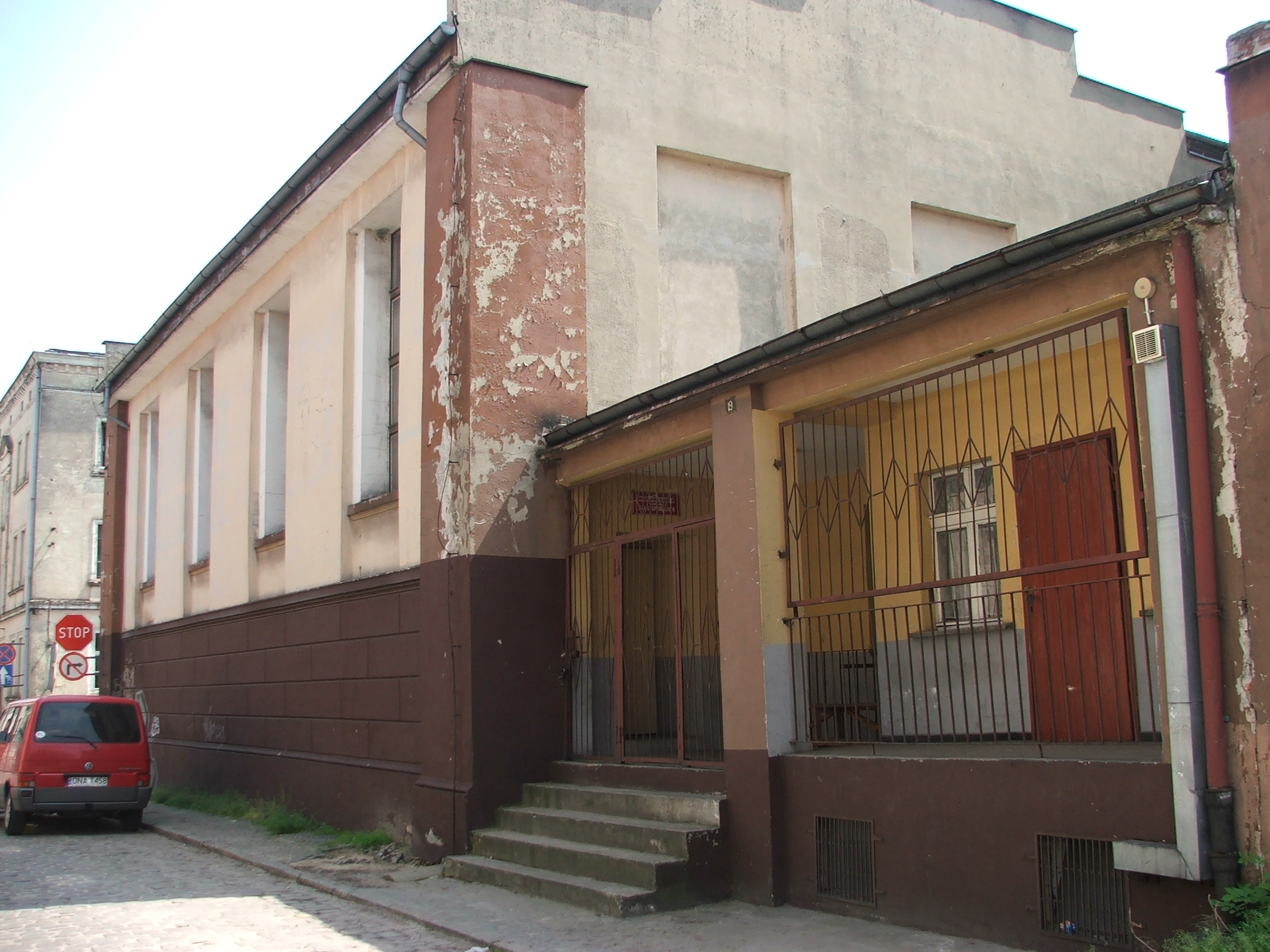 Synagogue in Namysłów